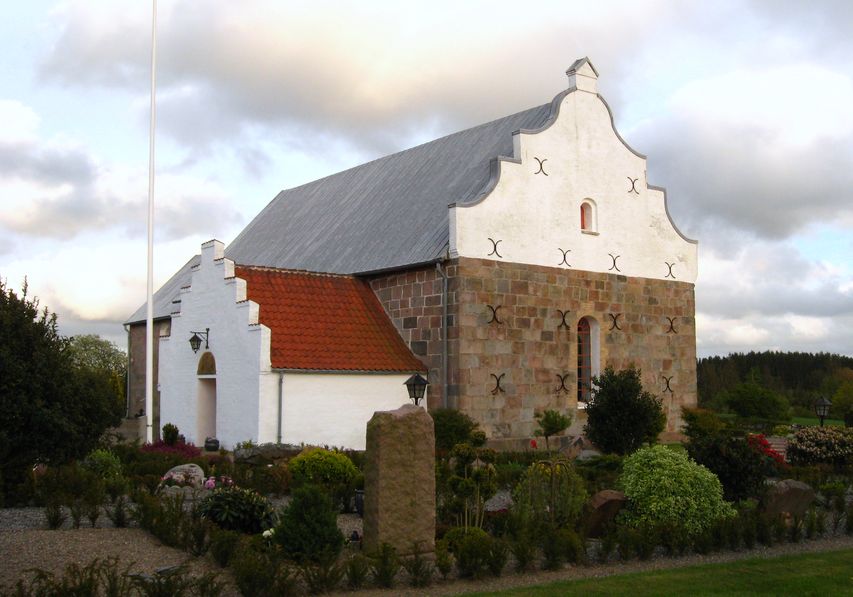 Bjergby Kirke, Hjørring Kommune